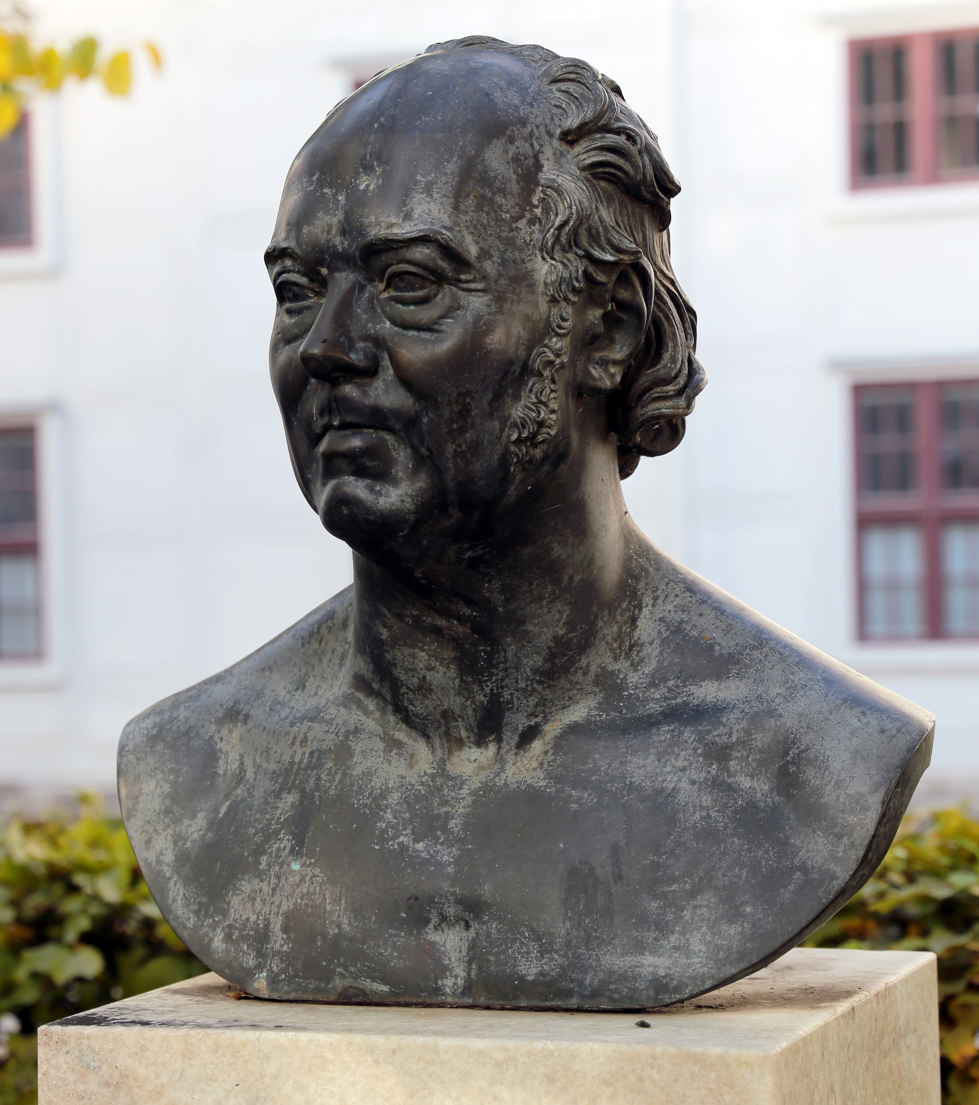 Denkmal August Hermann Niemeyer in den Frankeschen Stiftungen in Halle/Saale